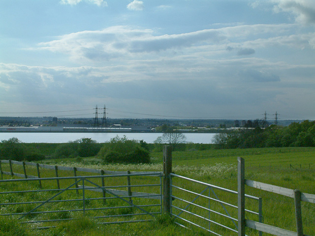 King George's Reservoir